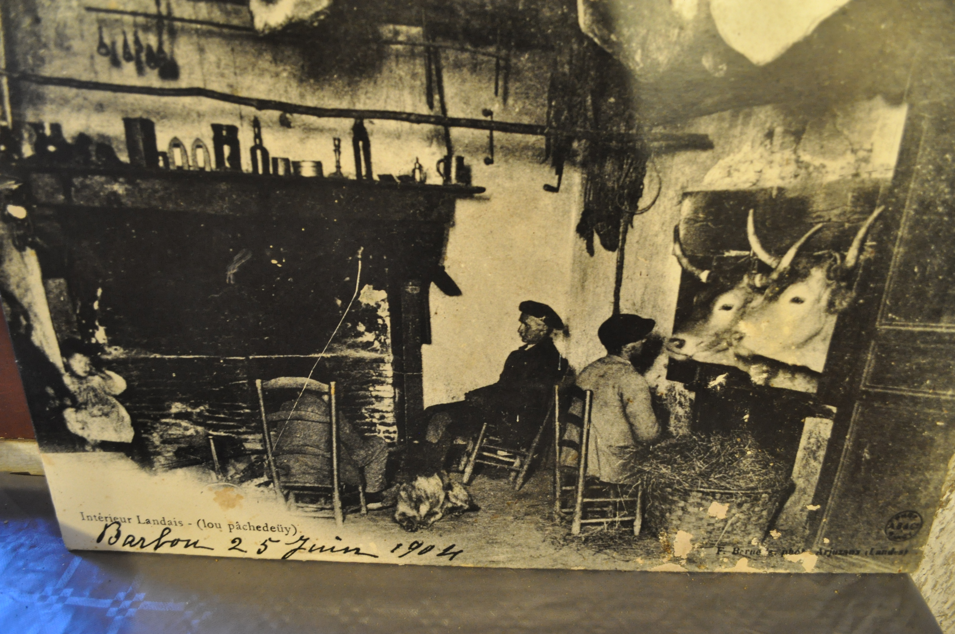 À l’intérieur des fermes landaises il y avait une fenêtre appelée en Gascon « lou pâchedeüy » à travers de laquelle on donnait à manger aux vaches. Photo prise en 1904)